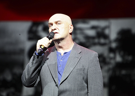 Выступление Александра Балуева на 60-летии Санкт-Петербургского суворовского военного училища